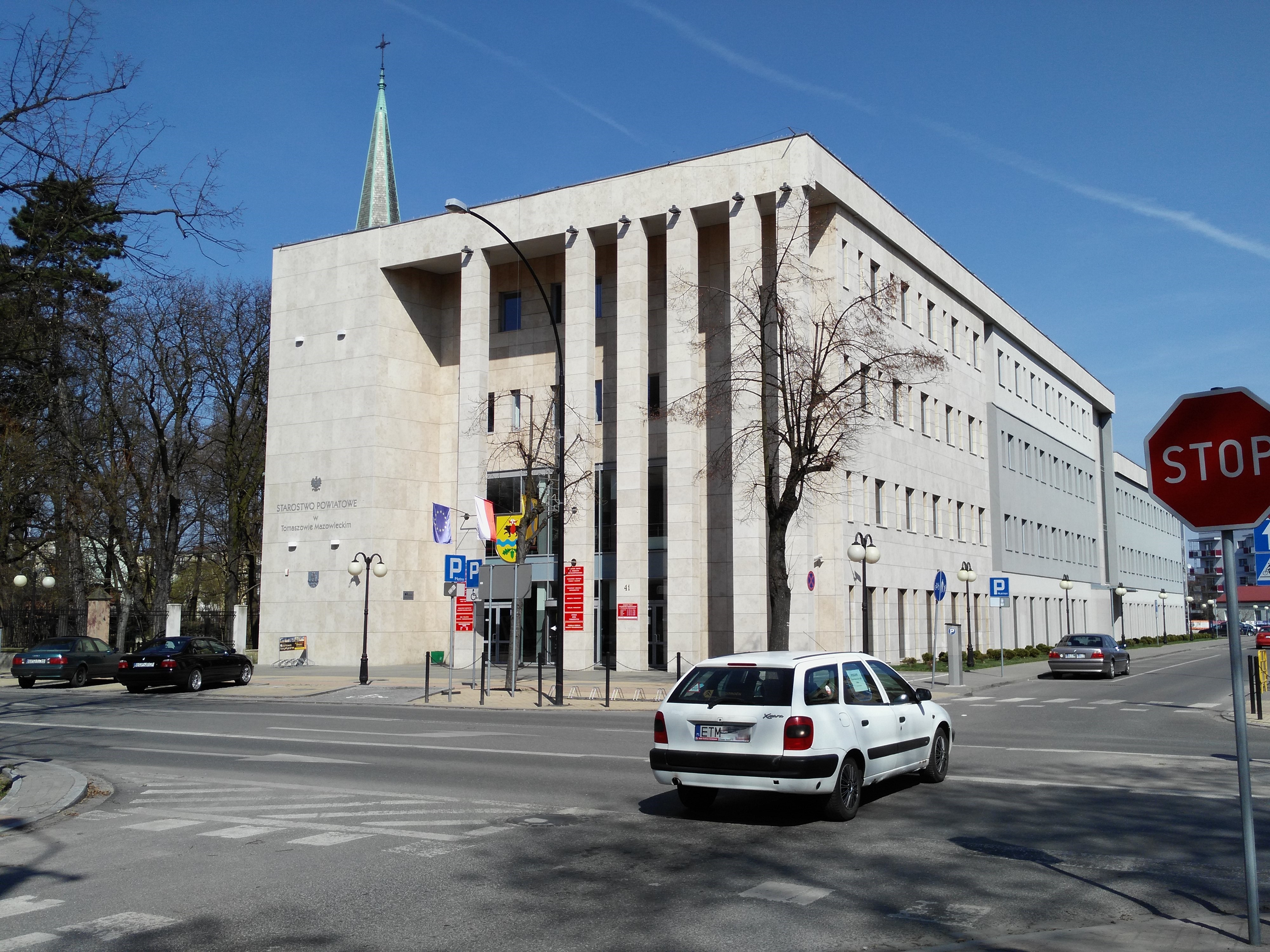 Budynek Starostwa Powiatowego na rogu św.Antoniego i Szkolnej w Tomaszowie Mazowieckim